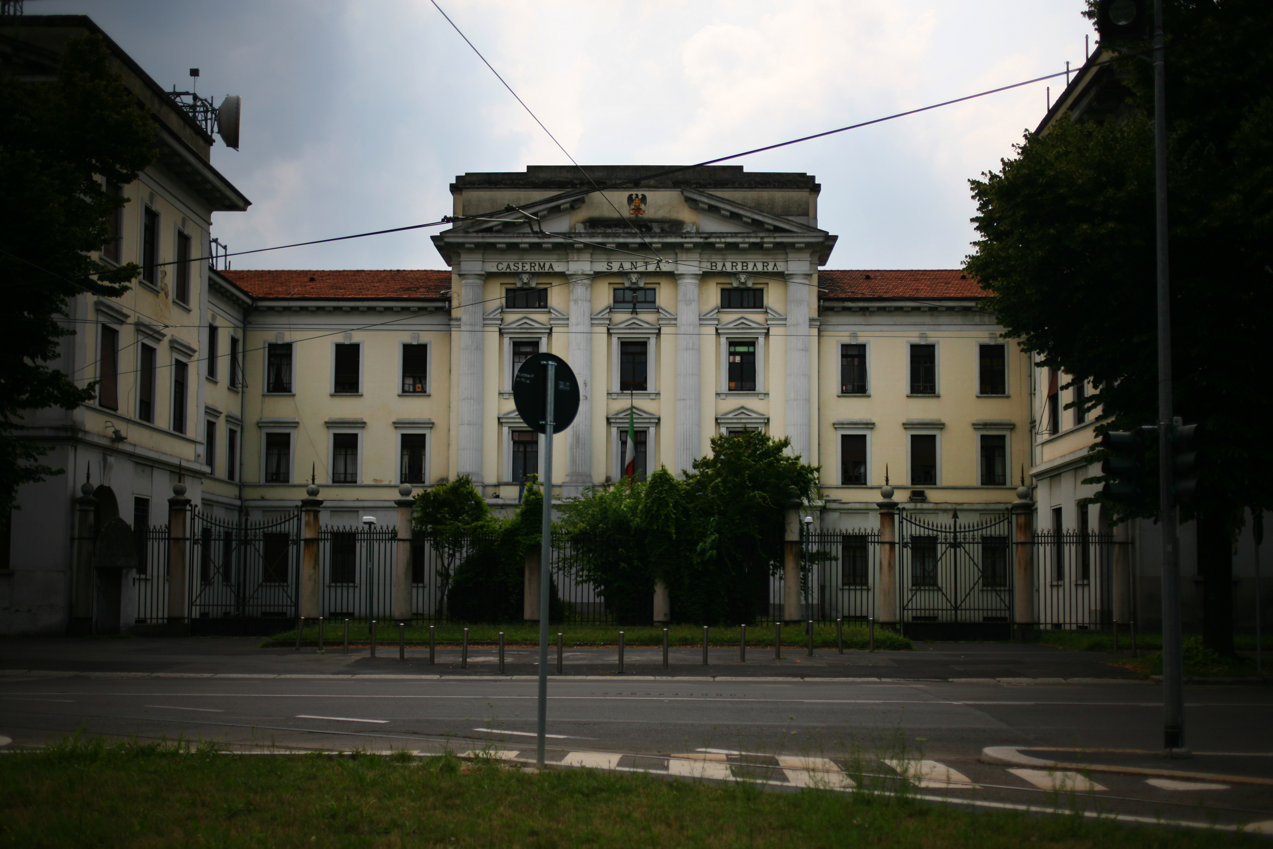 La Caserma Santa Barbara di Baggio, Milano